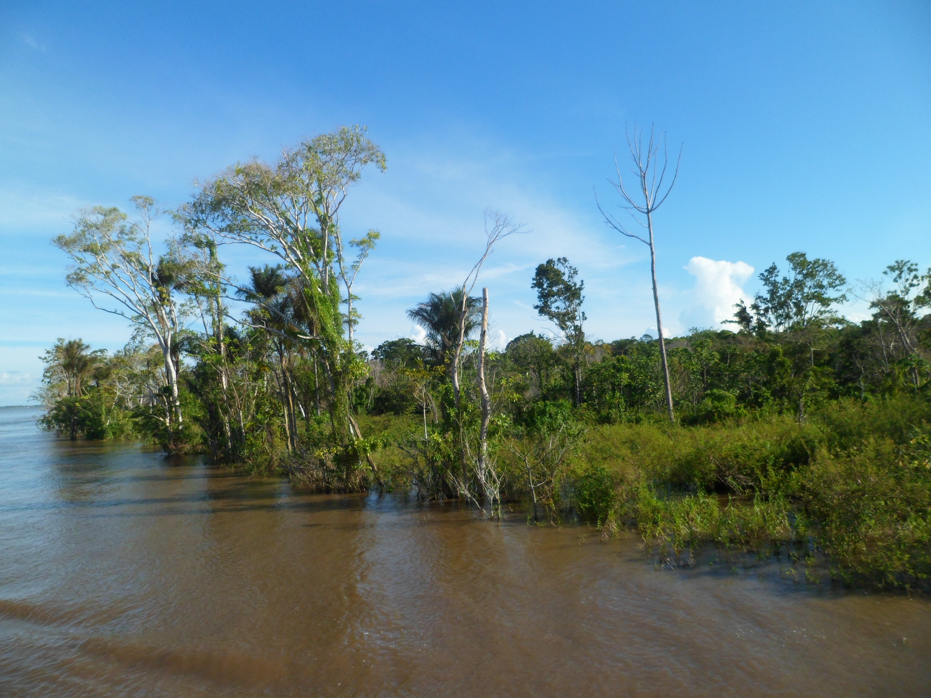 Português do Brasil: Descrição_para_sua_foto